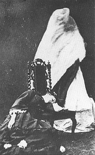 Katie King et Florence Cook prises en photo par William Crookes pour ses «Notes of an Enquiry into the Phenomena called Spiritual during the Years 1870-1873.», Quarterly Journal of Science., janvier 1874.